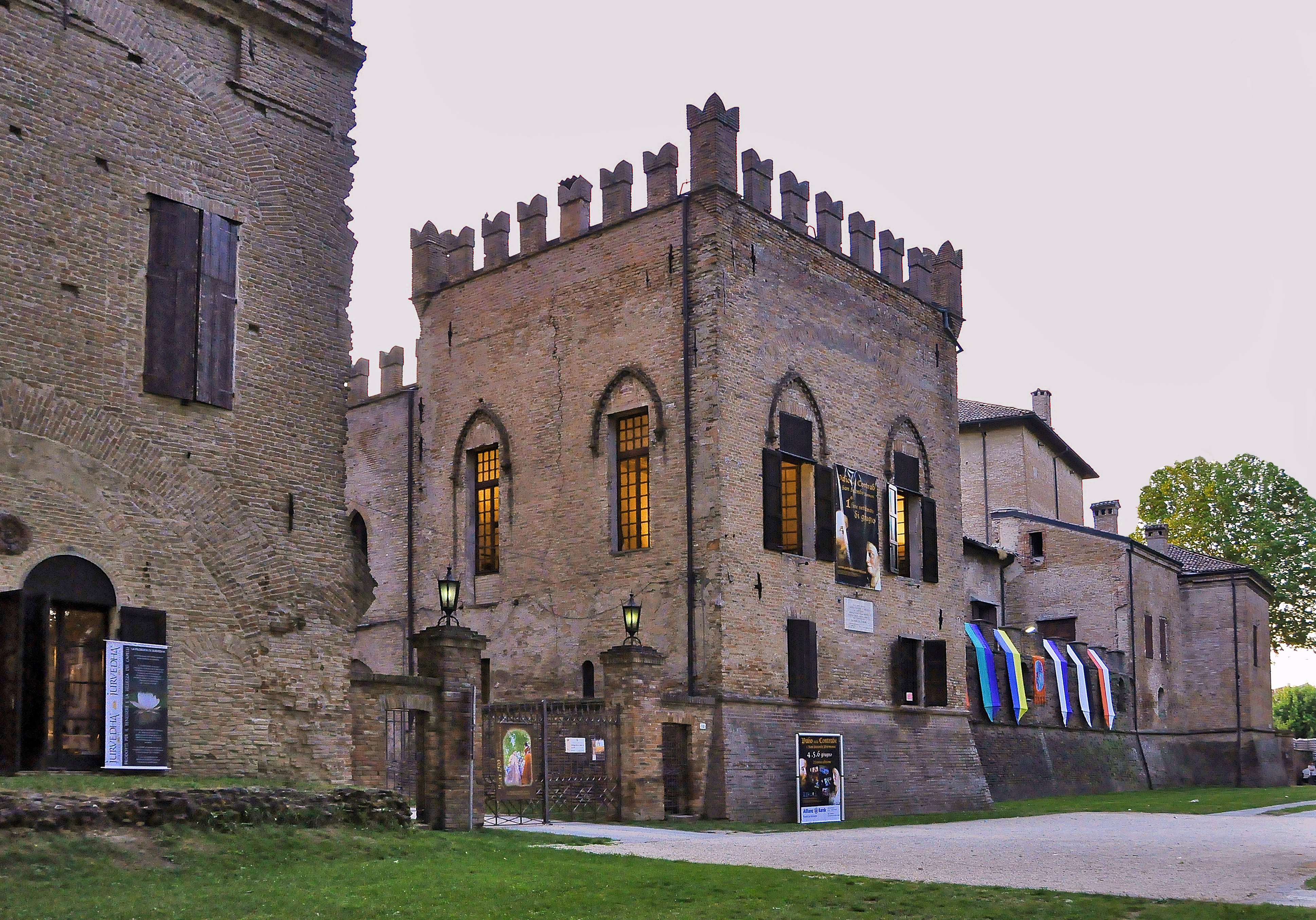 Rocca dei Rossi di San Secondo Parmense - MIBAC This is a photo of a monument which is part of cultural heritage of Italy.